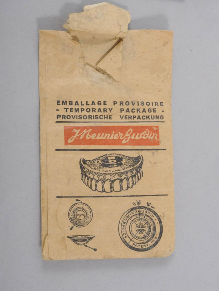 Bon état général ; 18/11/2010; Original caption: “Sachet imprimé sur les deux faces rectangulaire s’ouvrant par la largeur.”